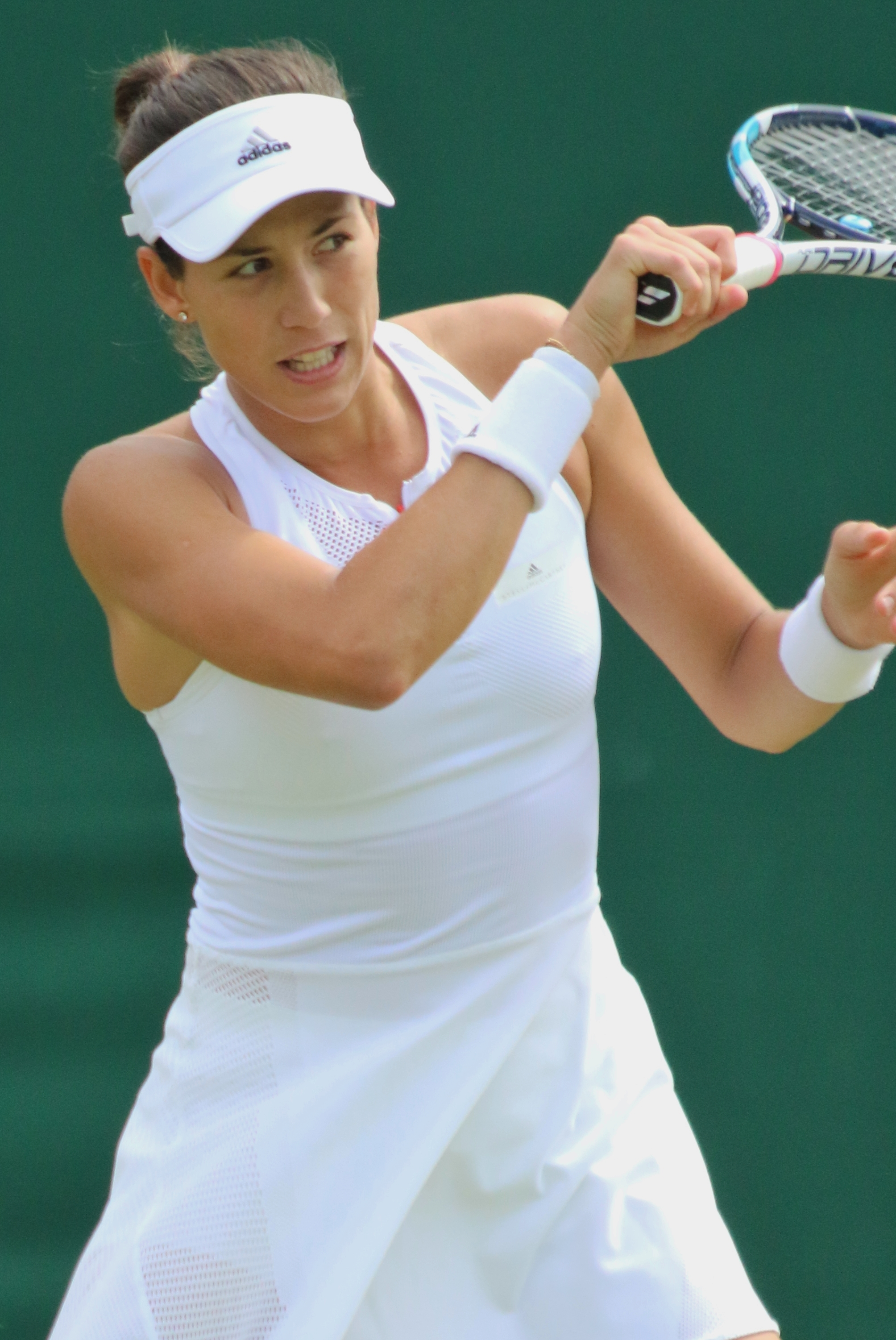 Muguruza WM17 (29)